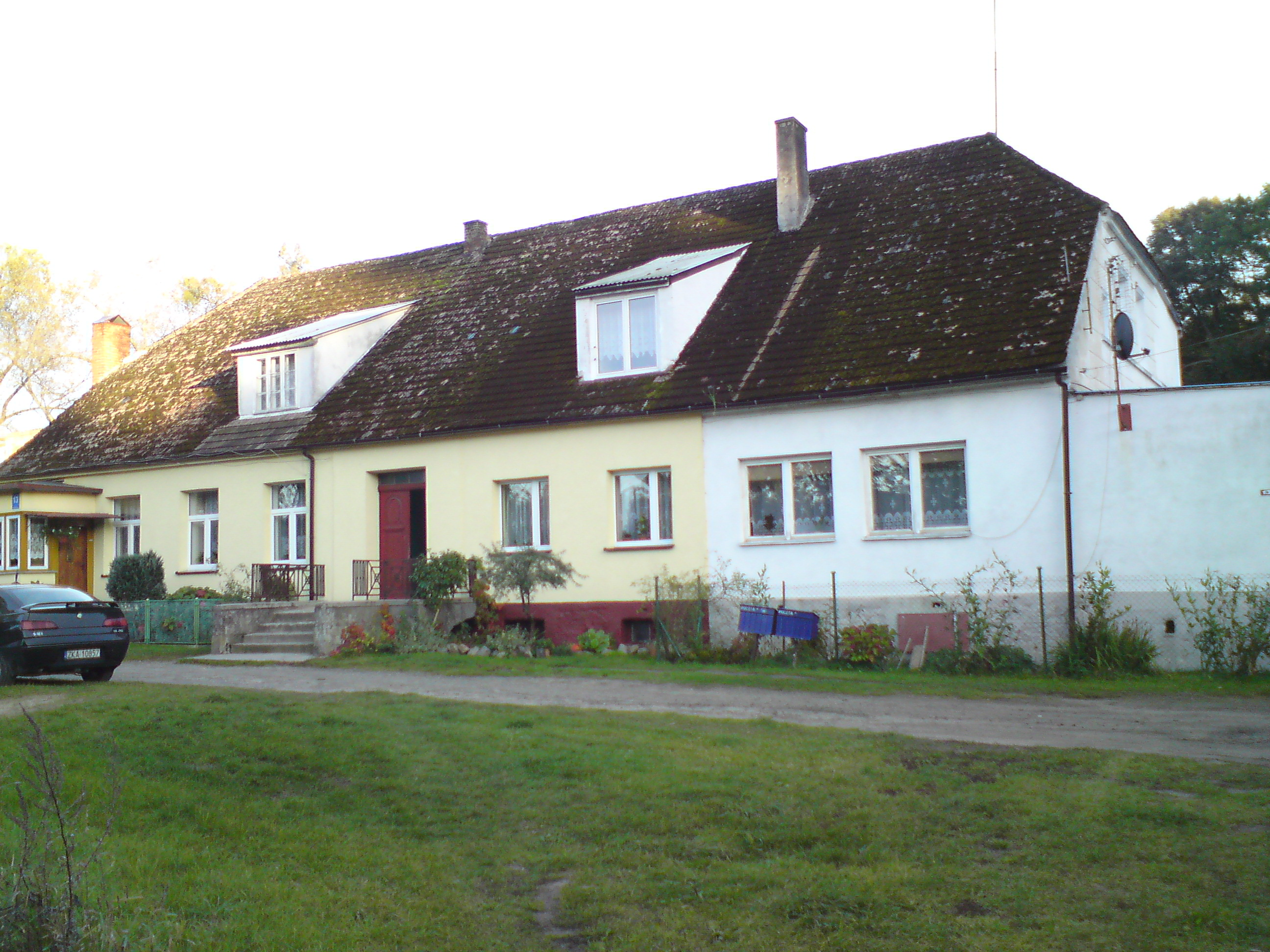 Dom który w XIX wieku należał do rodziny von Flemming'ów